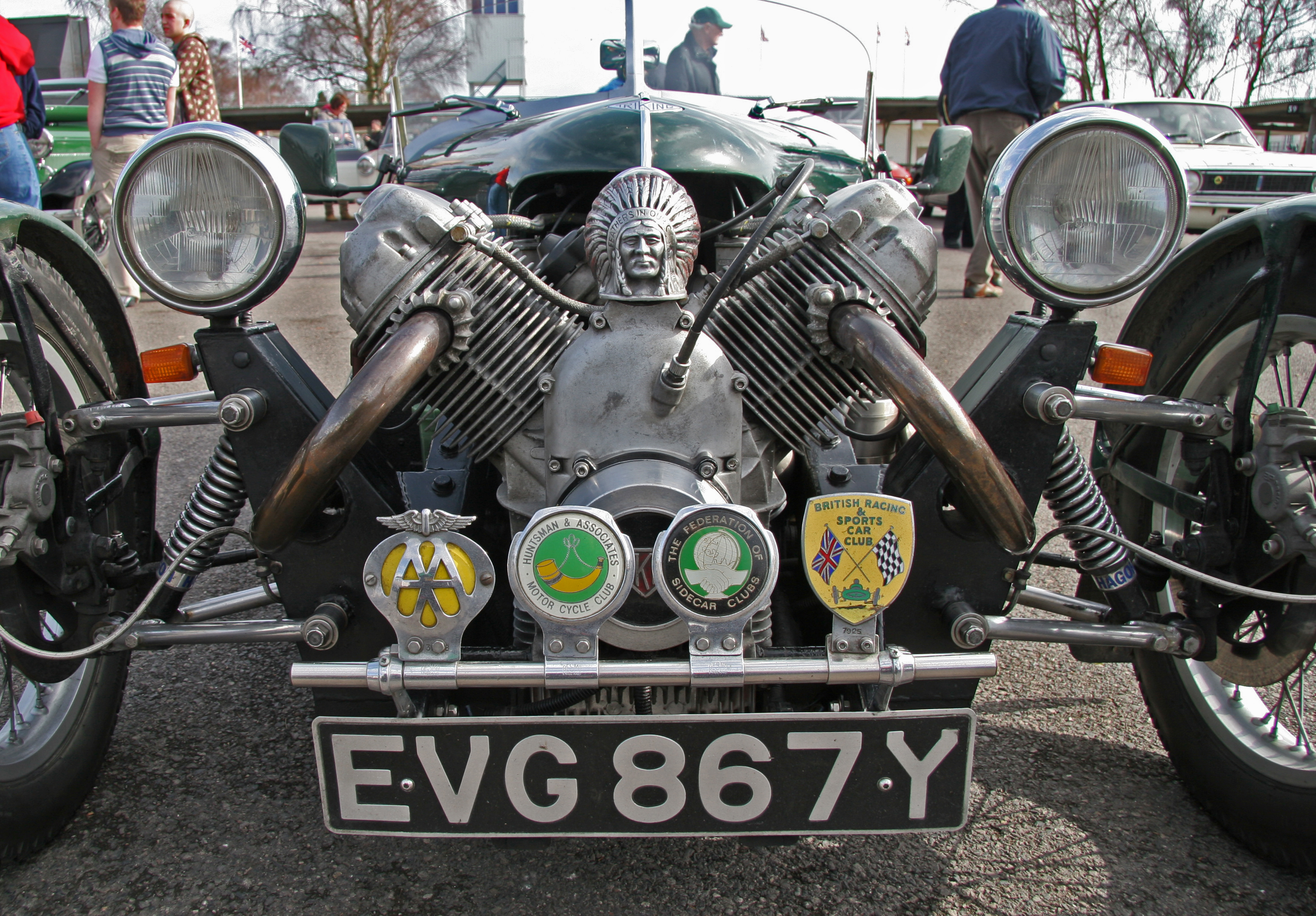 Triking Cyclecar